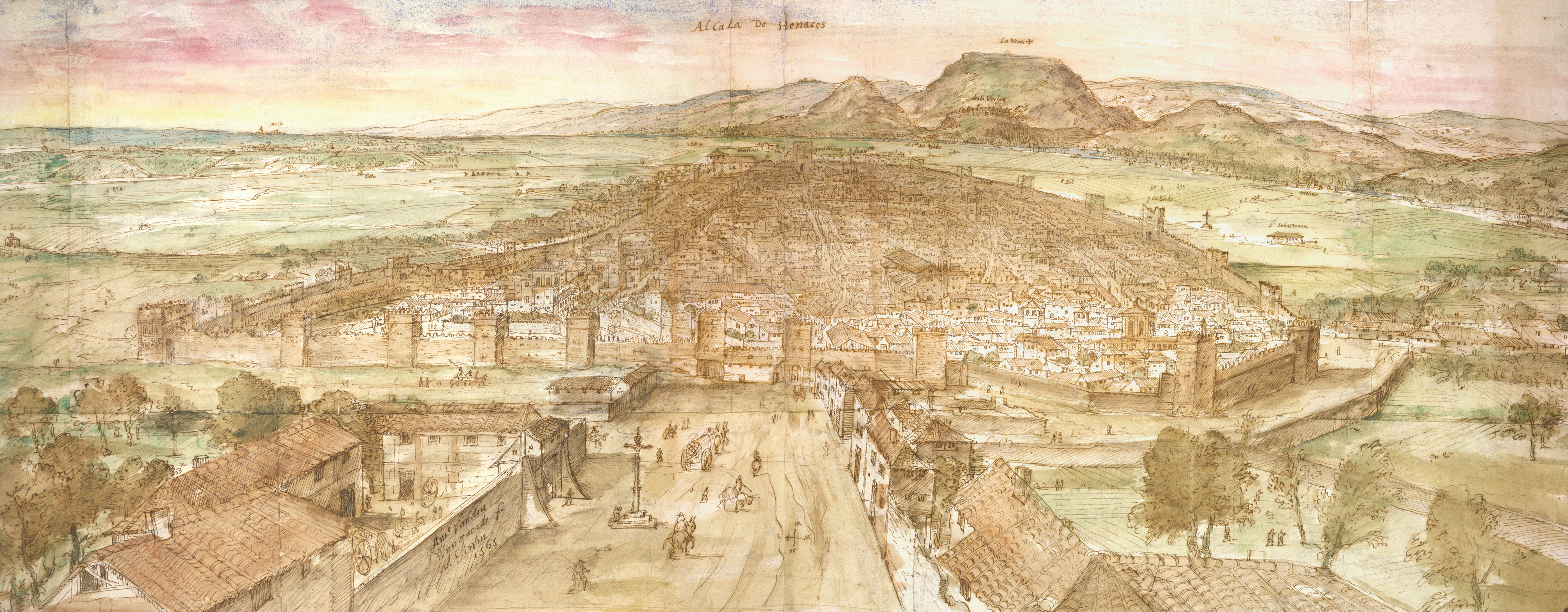 Dibujo de una vista general de Alcalá de Henares, realizado por Anthonis van den Wijngaerde en 1565. Dimensiones: 42,33 cm por 16,83 cm. La acuarela original está en la Biblioteca Nacional de Austria (Österreichische Nationalbibliothek).